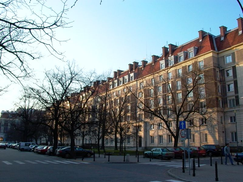 Aleja Wyzwolenia in Warsaw, Poland. Author: Zbigniew Strucki